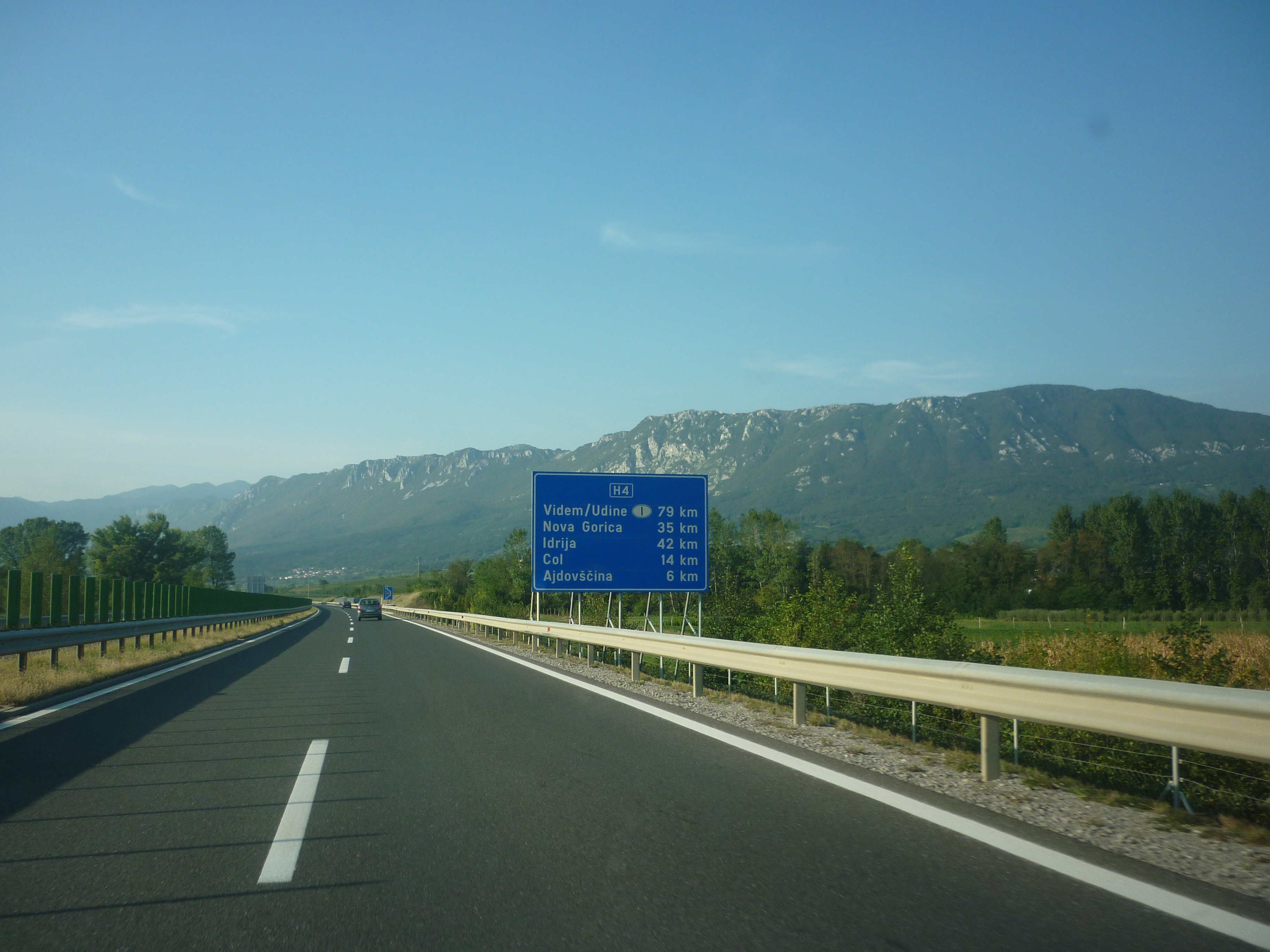 H4